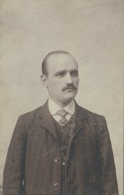 Портретна снимка на Борис Савов.